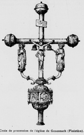 Croix de procession de l'église de Gouesnach